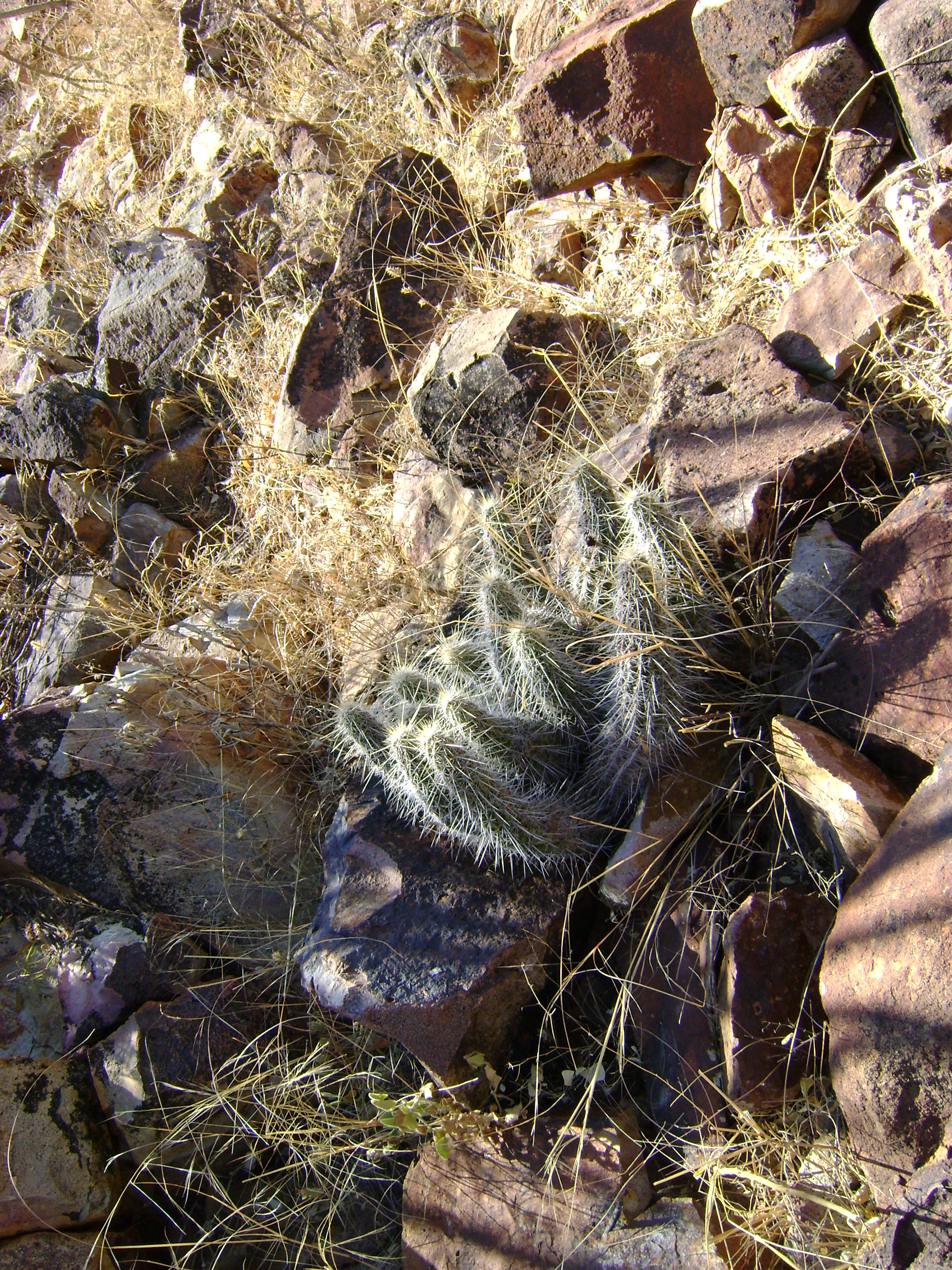 Rio Nazas, Durango